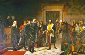 Pintura de Juan Cingolani sobre Torquato Tasso.